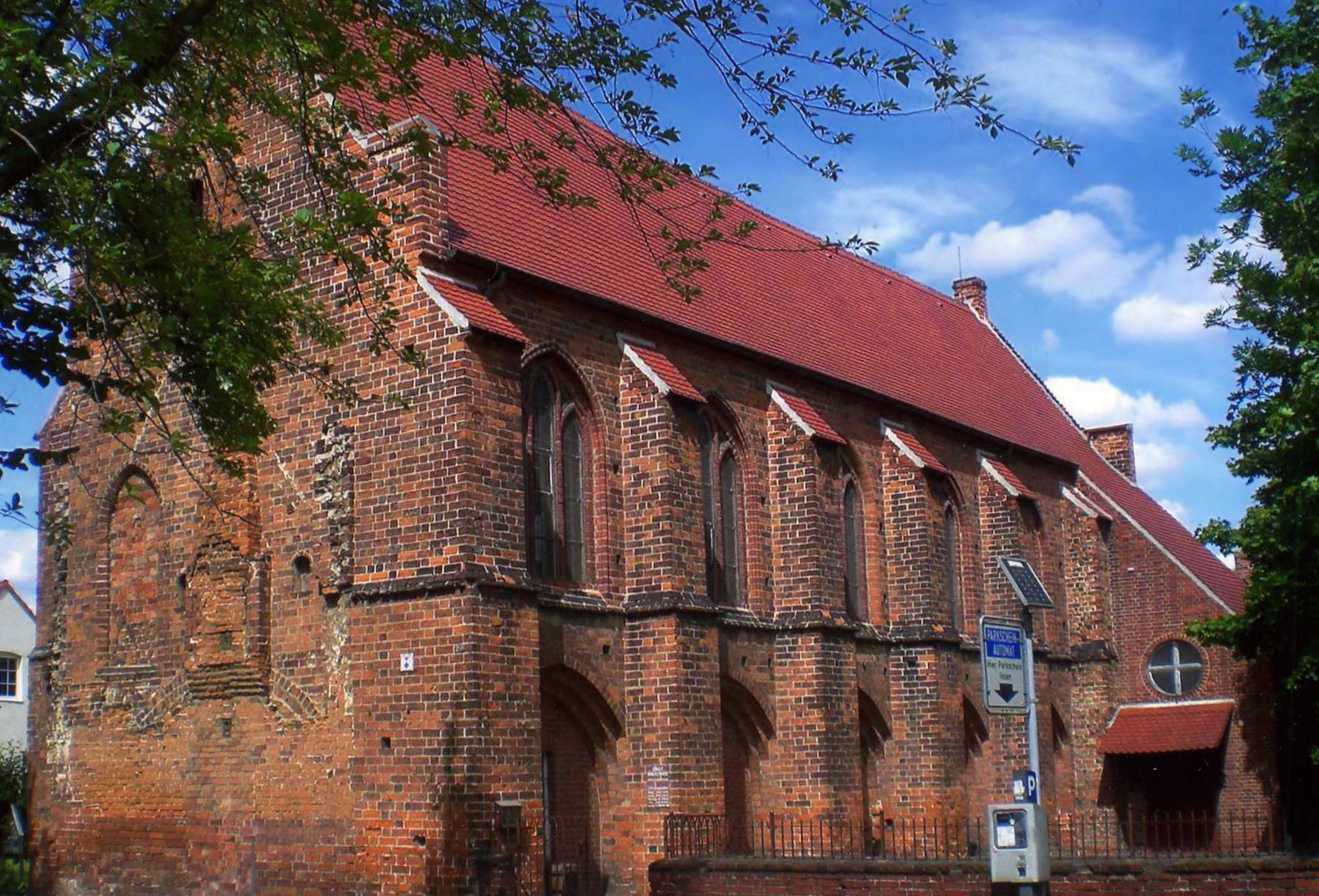 Refektorium des ehemaligen Franziskanerklosters Stendal (heutige Stadtbibliothek)